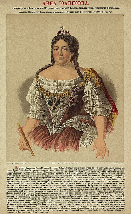 Illustration to book: Российский царственный дом Романовых. – СПб.: Издание Г.К. Фриденбурга, 1853.